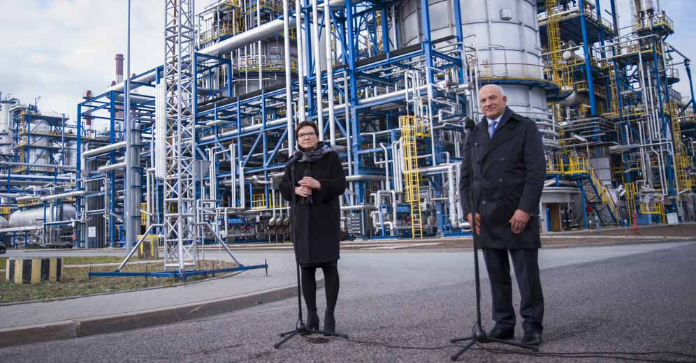 Gdańsk Rudniki. Premier Ewa Kopacz i prezes zarządu Grupy Lotos Paweł Olechnowicz w Rafinerii Gdańskiej (Grupa Lotos).